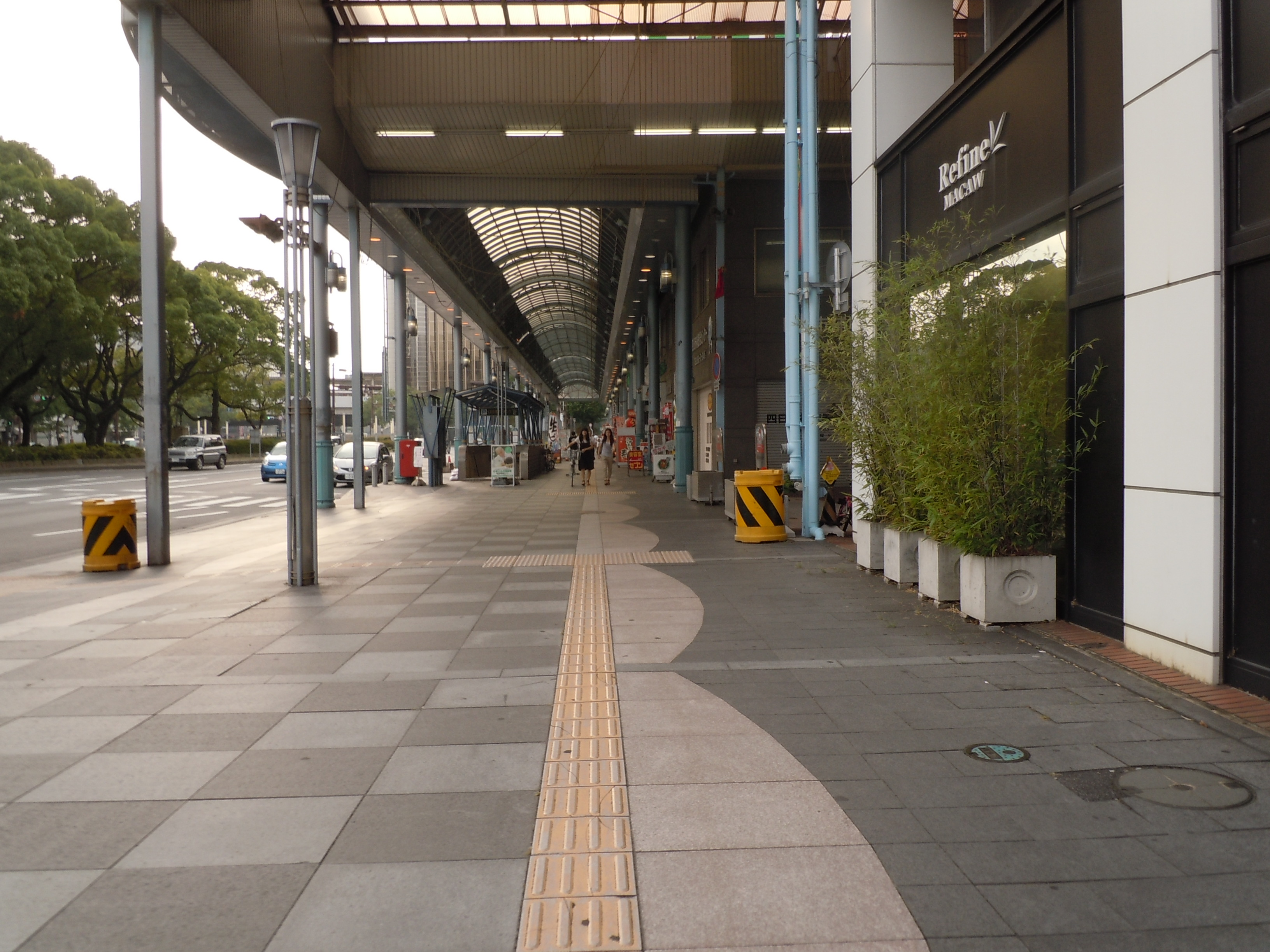 近鉄四日市駅東バスのりば（一番街商店街）